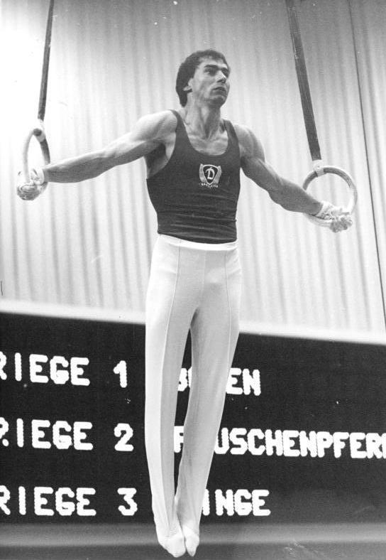 Roland Brückner ADN-ZB Mittelstädt 22.5.80 Berlin:32.DDR-Meisterschaften im Turnen-Roland Brückner vor erfolgreicher Titelverteidigung -Der 24jährige Roland Brückner (SC Dynamo Berlin) war am 21.5. nach seinen 56,95 Pflichtpunkten mit 56,90 Zählern auch der beste Kürturner des 23köpfigen Teilnehmerfeldes. Für seine Kür an den Ringen hier beim schwierigen Kreuzhang - erhielt der Titelverteidiger 9,45 Punkte.